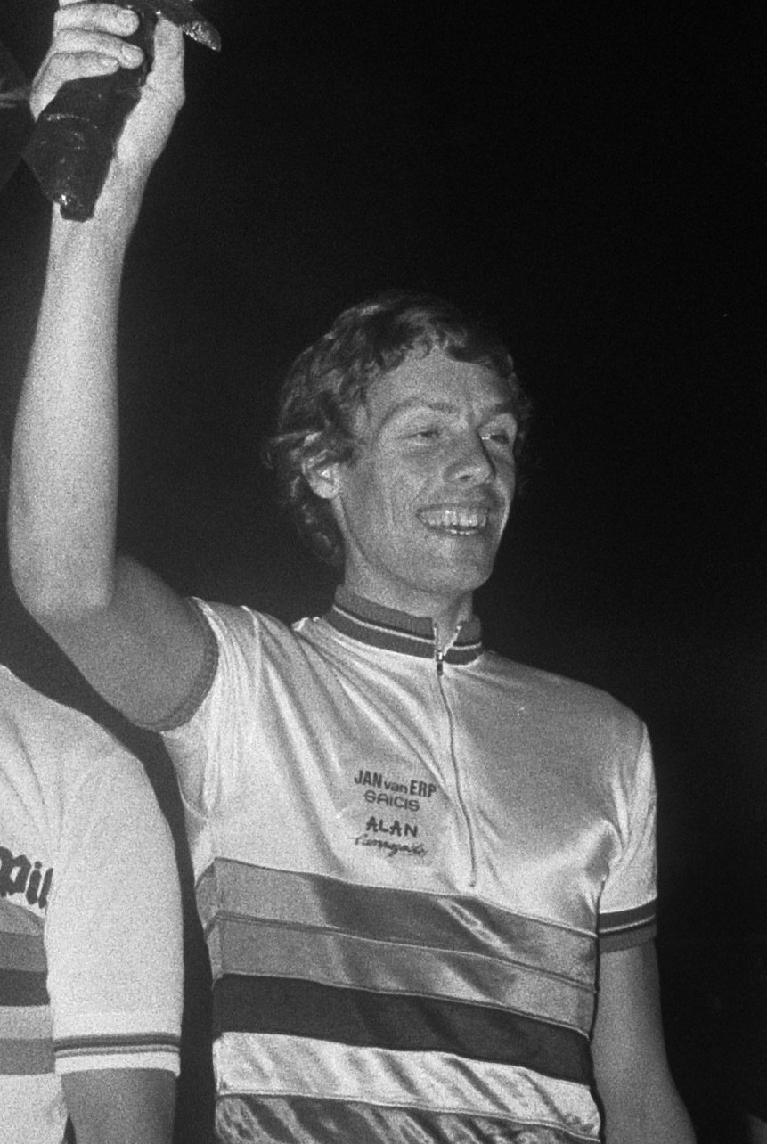 Huldiging wereldkampioenen wielrennen op wielerbaan: Andre Gevers